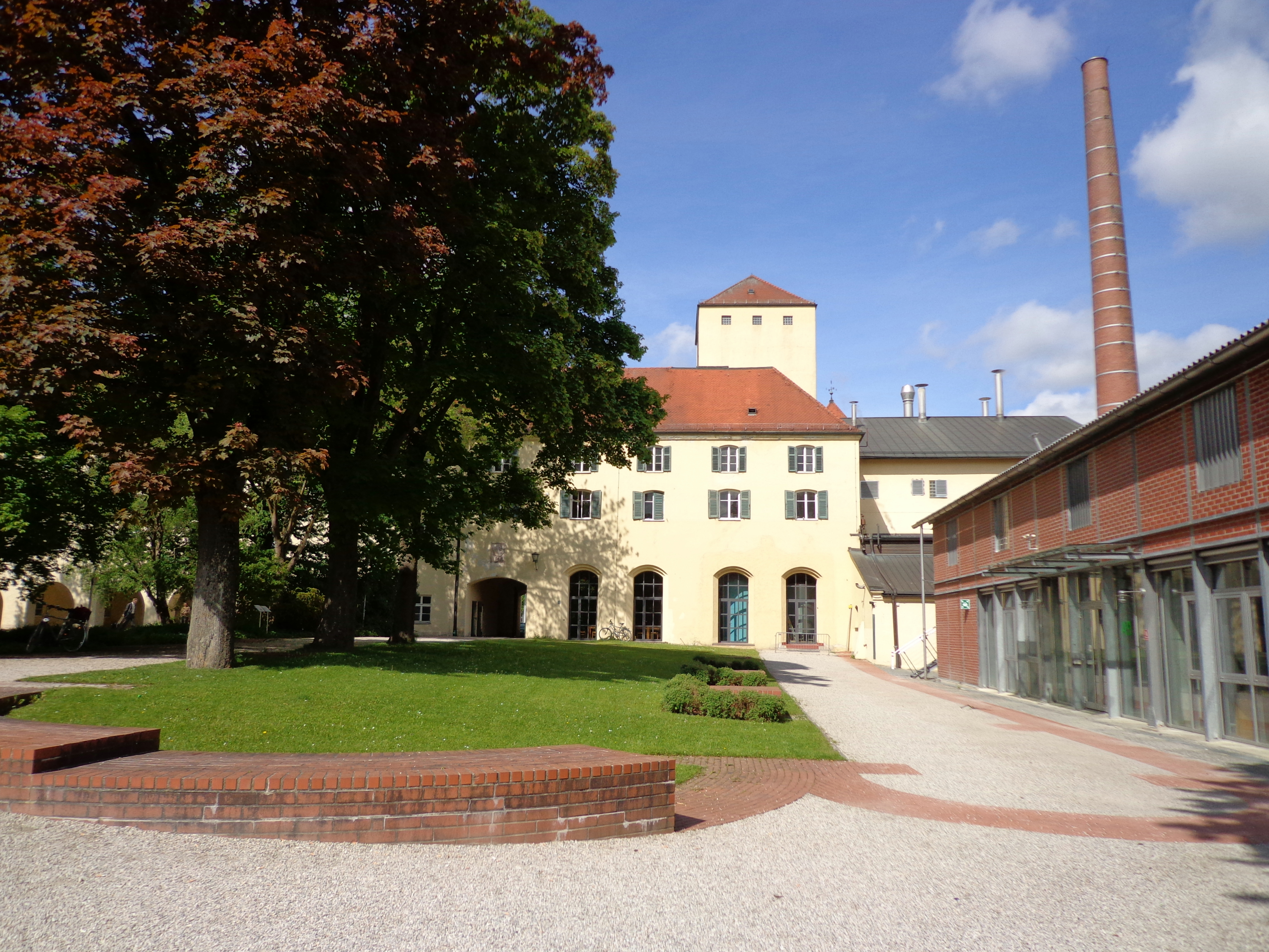 Reste der alten Klosterkirche als Fundamente im Boden, Blick auf die Staatsbrauerei Weihenstephan